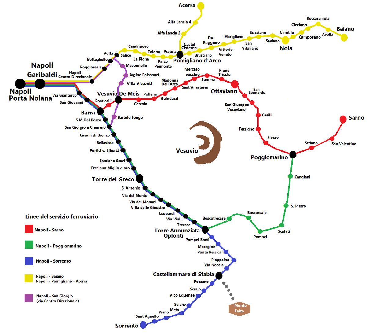 Mappa della rete della Circumvesuviana.